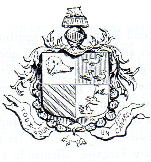 Blason de la Société des Agathopèdes, Bruxelles, vers 1850.